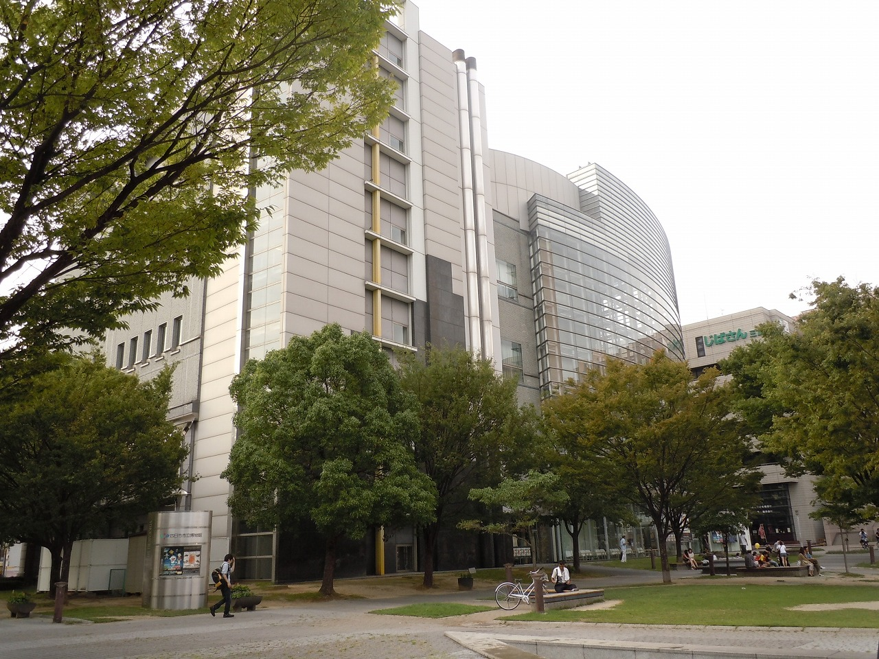 市民公園横にある四日市市立博物館